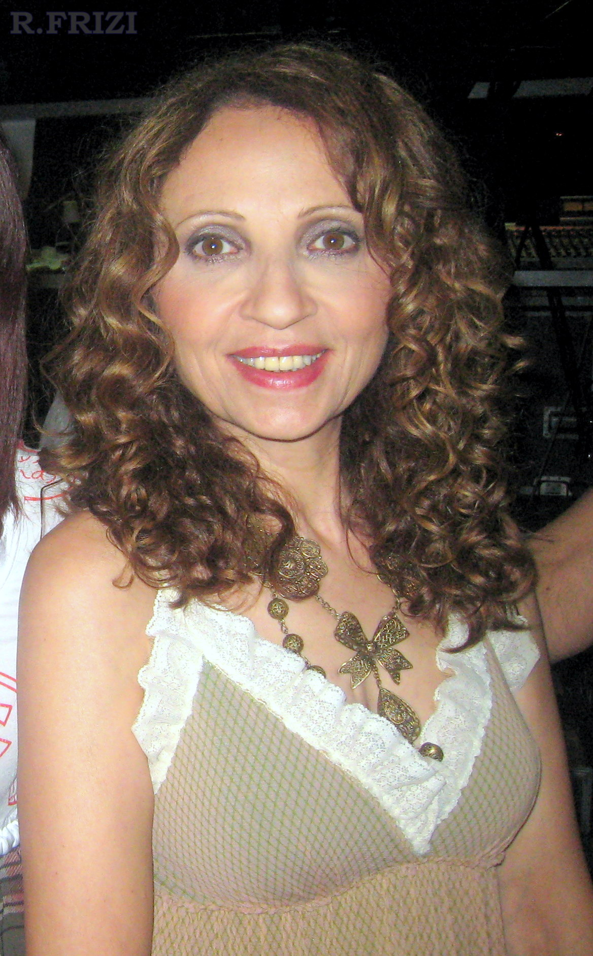 התמונה צולמה בחיפה באירוע ערב גאלה של עמותת "בית חם" מרכז לילדים עם צרכים מיוחדים, וילדים מונשמים ילדי S.M.A.